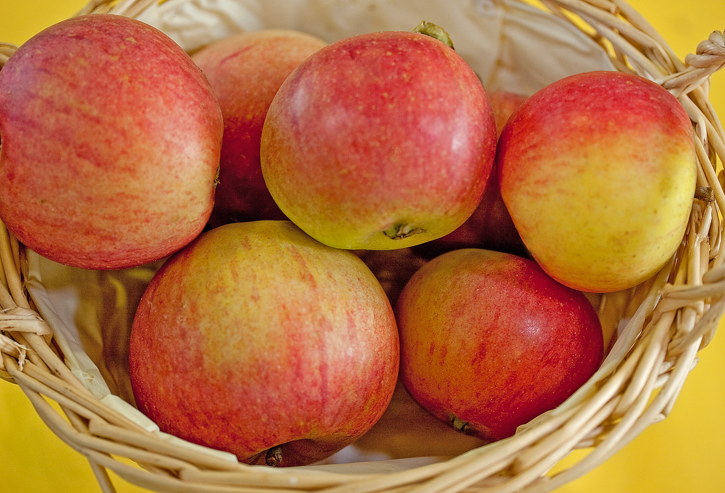 Der Allington Pepping ist eine Apfelsorte